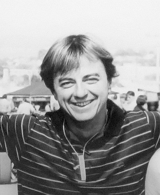 Automobilový závodník ing. Zdeněk Vojtěch (Brno 1982)